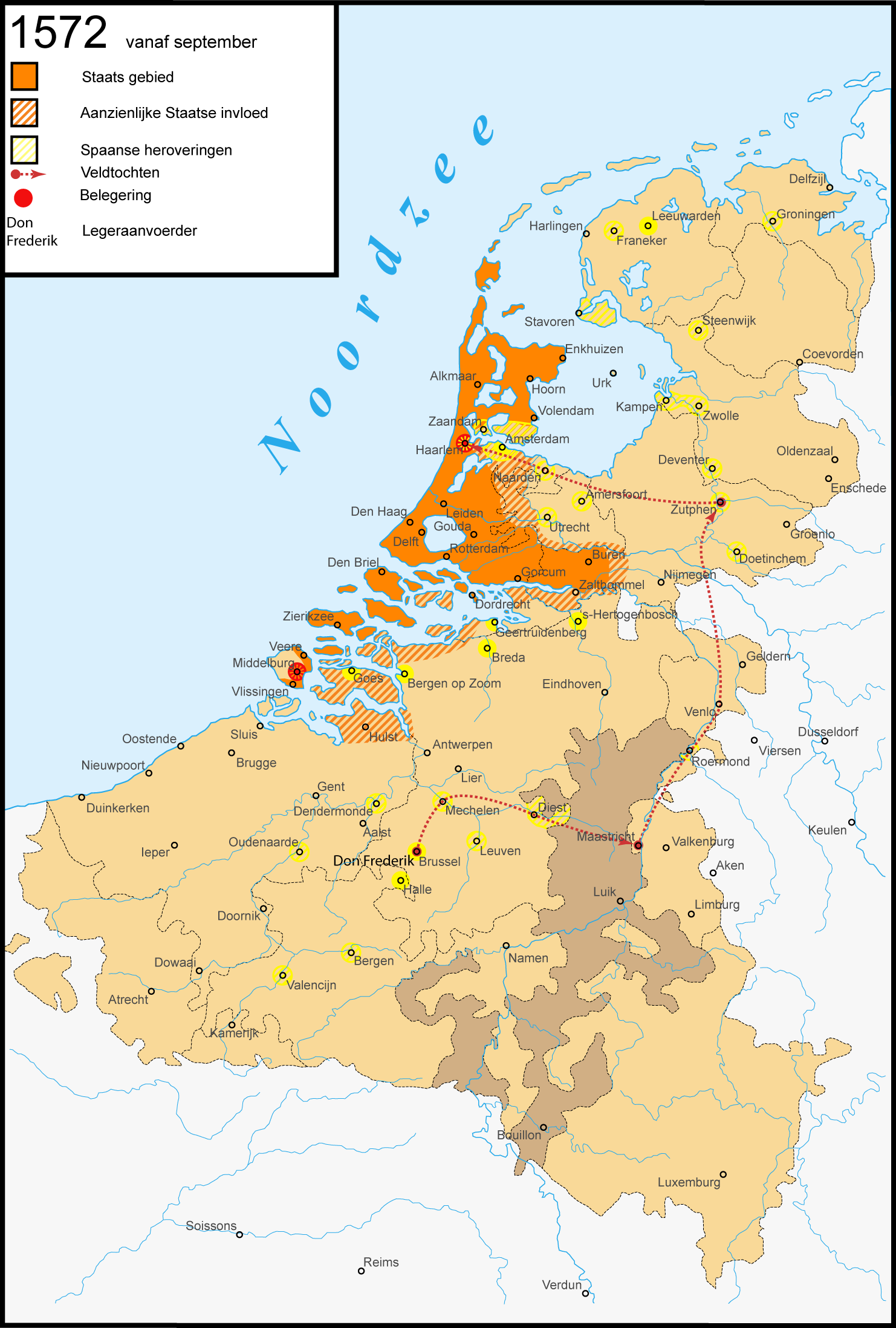 Krijgsbewegingen in de Tachtigjarige Oorlog: 1572 vanaf september. Nederlandse versie Engels: Warprogression in het Eighty Years' War: 1572 starting in september. Dutch version